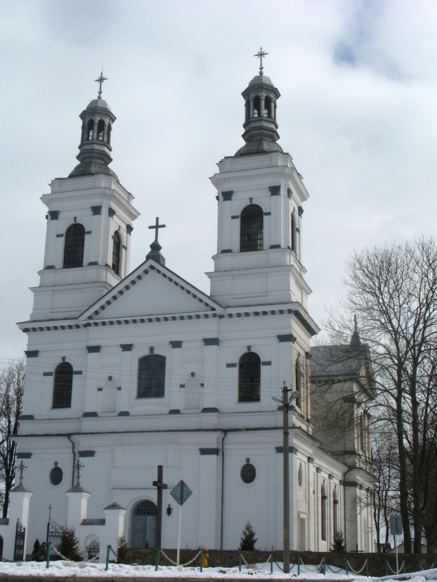 Беларуская (тарашкевіца): Касьцёл у Лынтупах